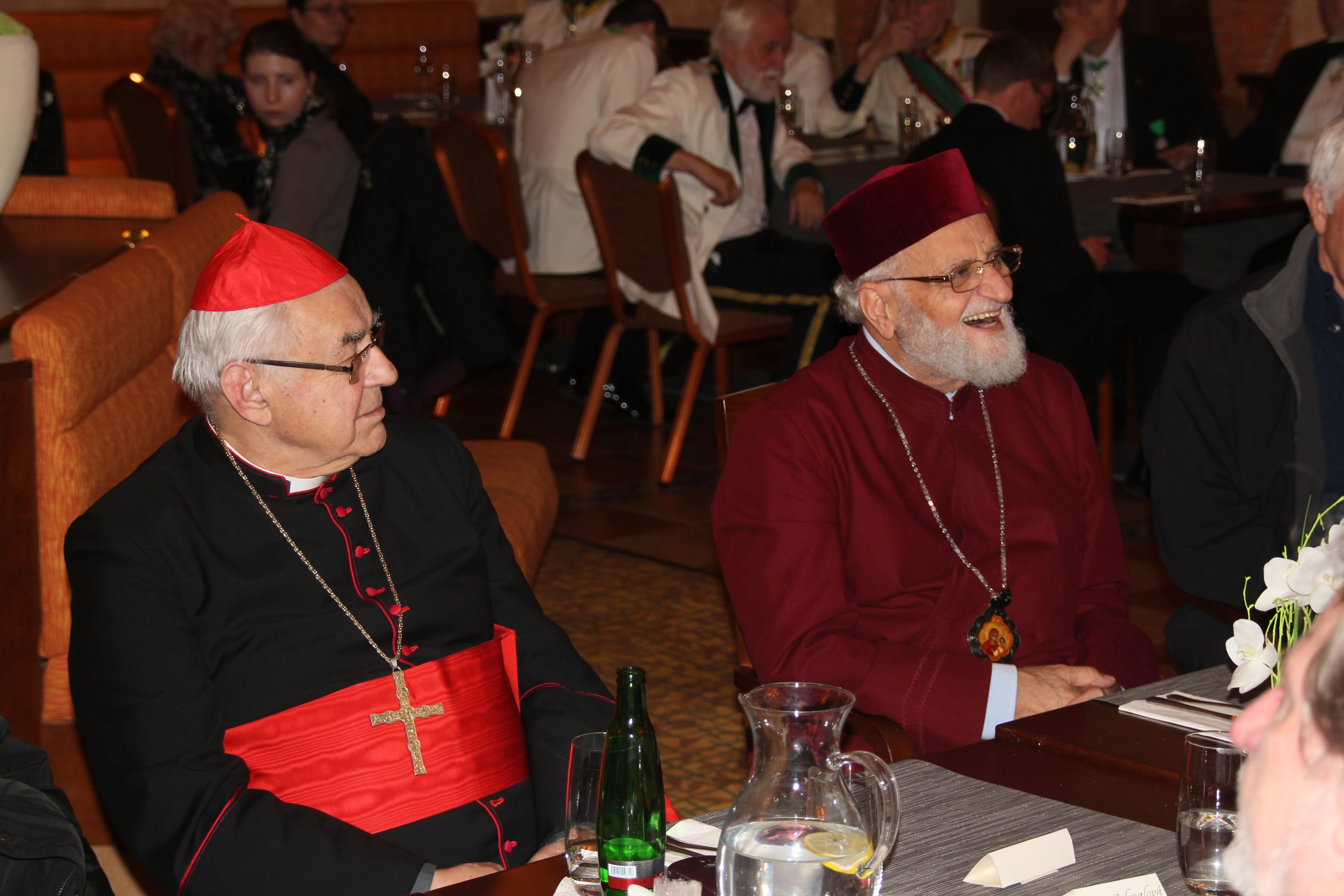 Miloslav Vlk povolán českým kaplanem Řádu sv. Lazara.